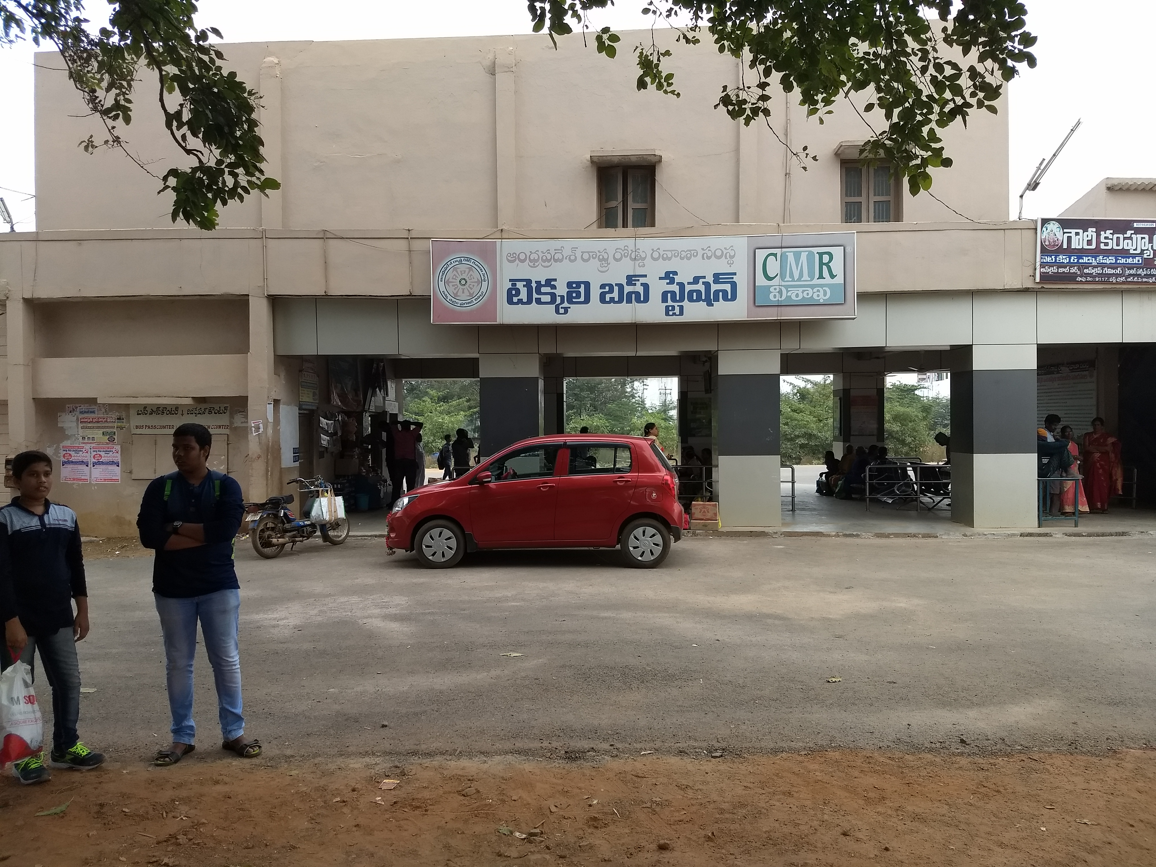 Tekkali bus station